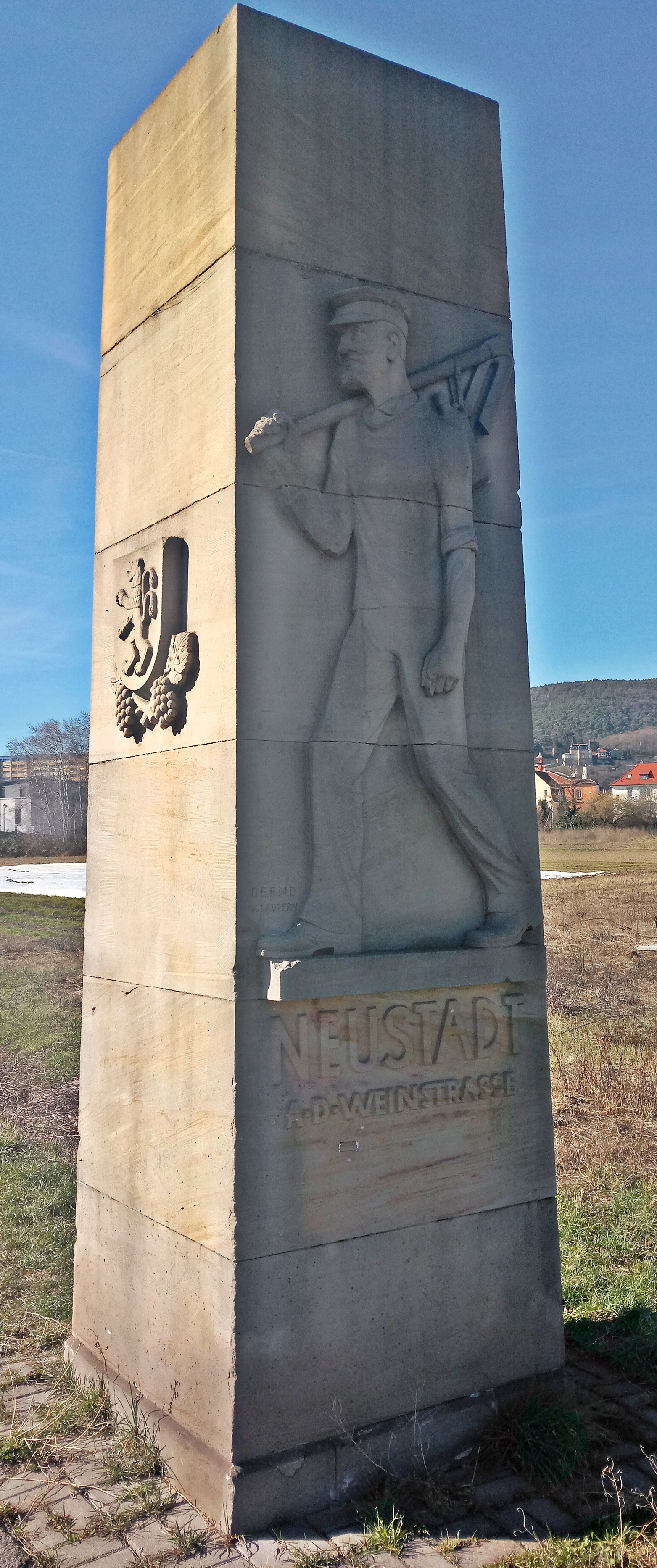 Neustadt, Ortseingang aus Rtg. Mußbach, Stele mit Ortsname und Winzer, von G.A. Bernd